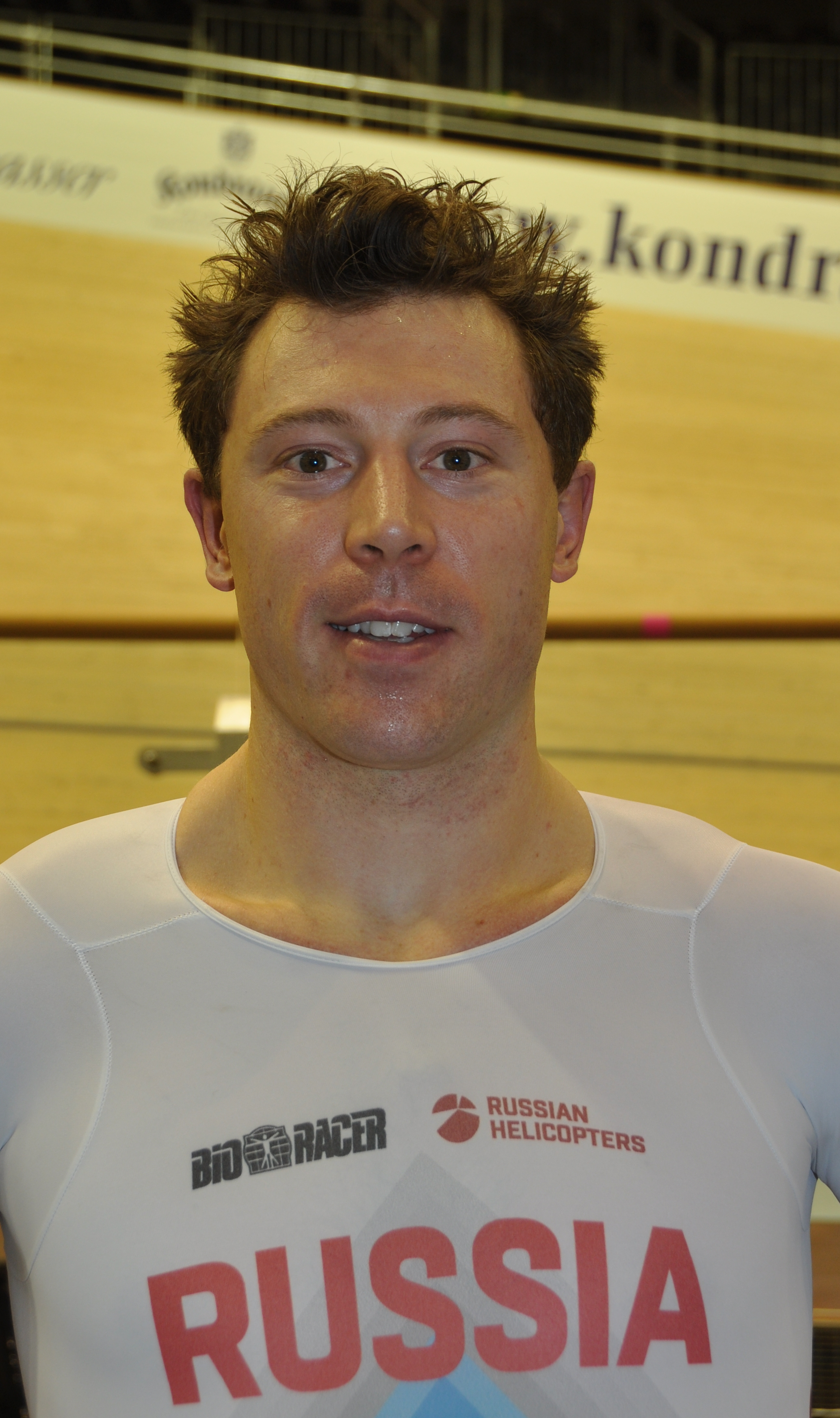 Shane Perkins, russisch-australischer Radsportler